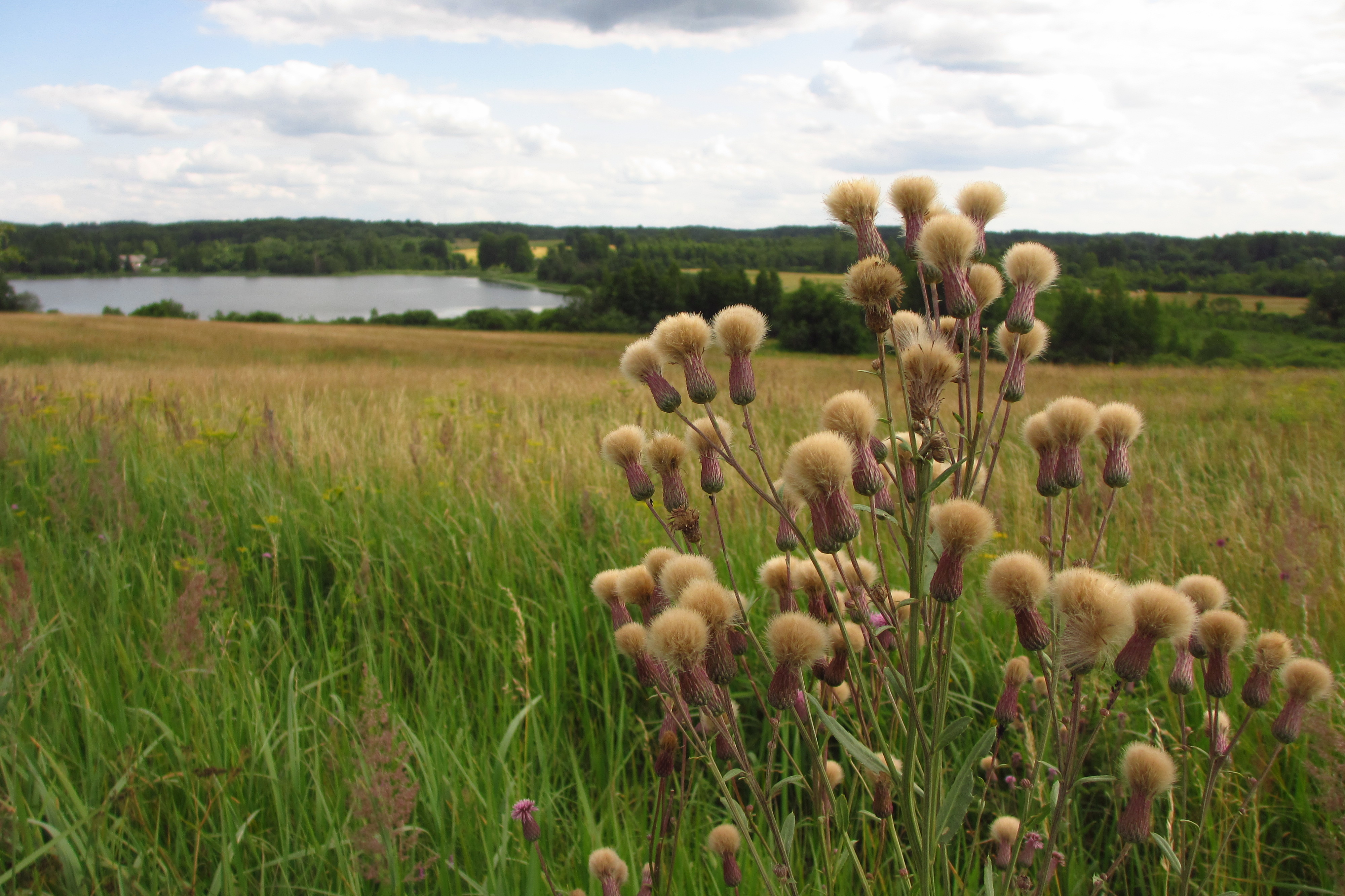 Vaade Kivijärvele Pangodi MKA-l